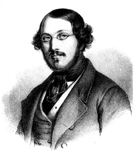 Billede af Tivolis grundlægger (31. august 1812 i Algier, hvor hans far var generalkonsul - 4. januar 1857 i København) var en dansk officer og iværksætter. Han var grundlægger af Tivoli, Casino og Alhambra, 3 forlystelsessteder i København.